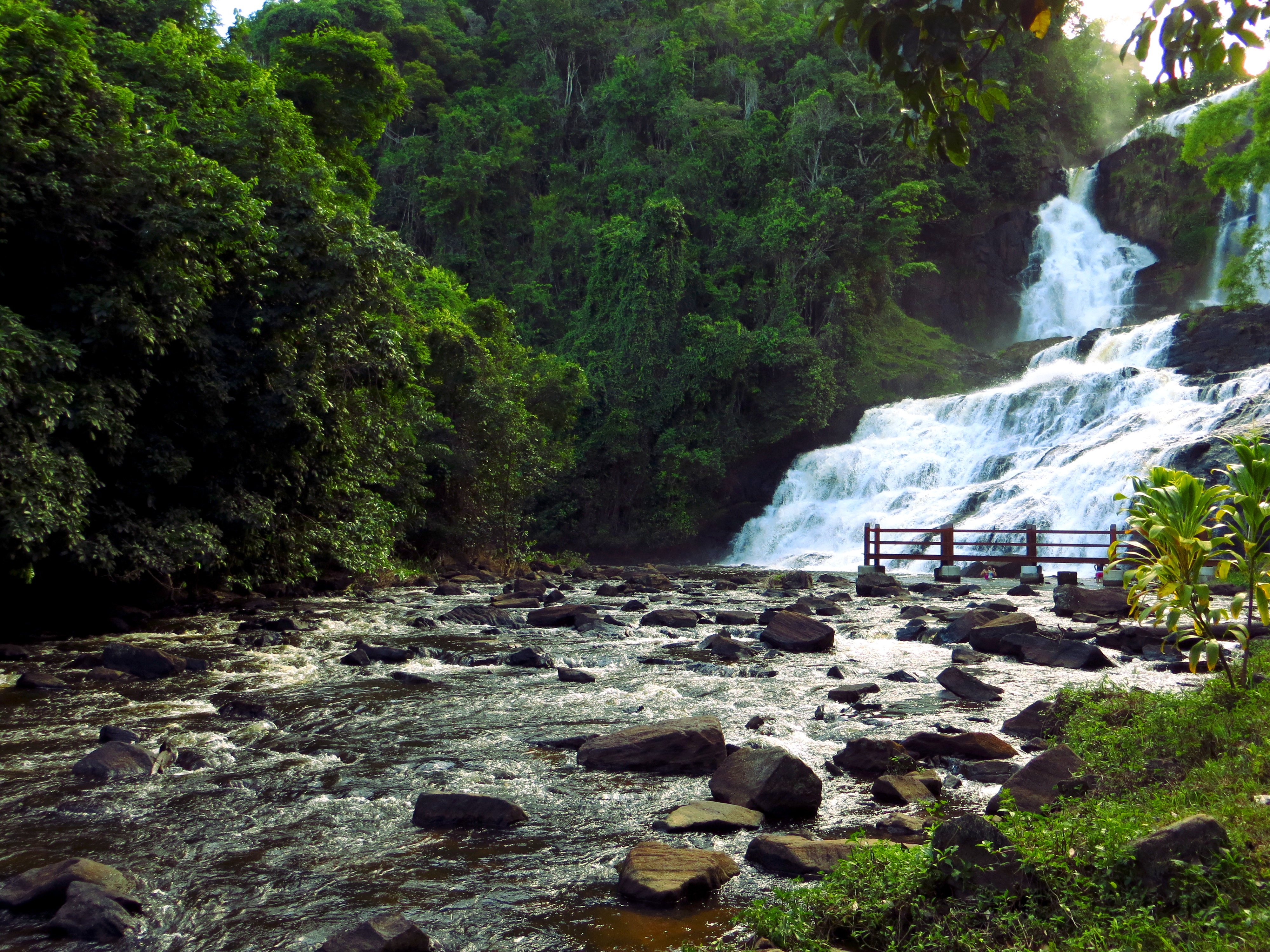 A cachoeira da Pancada Graqnde fica na cidade de Ituberá no litoral Sul da Bahia